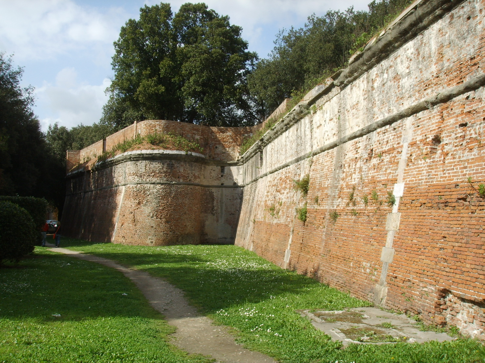 Giardino di Scotto bastione (cittadella nuova)